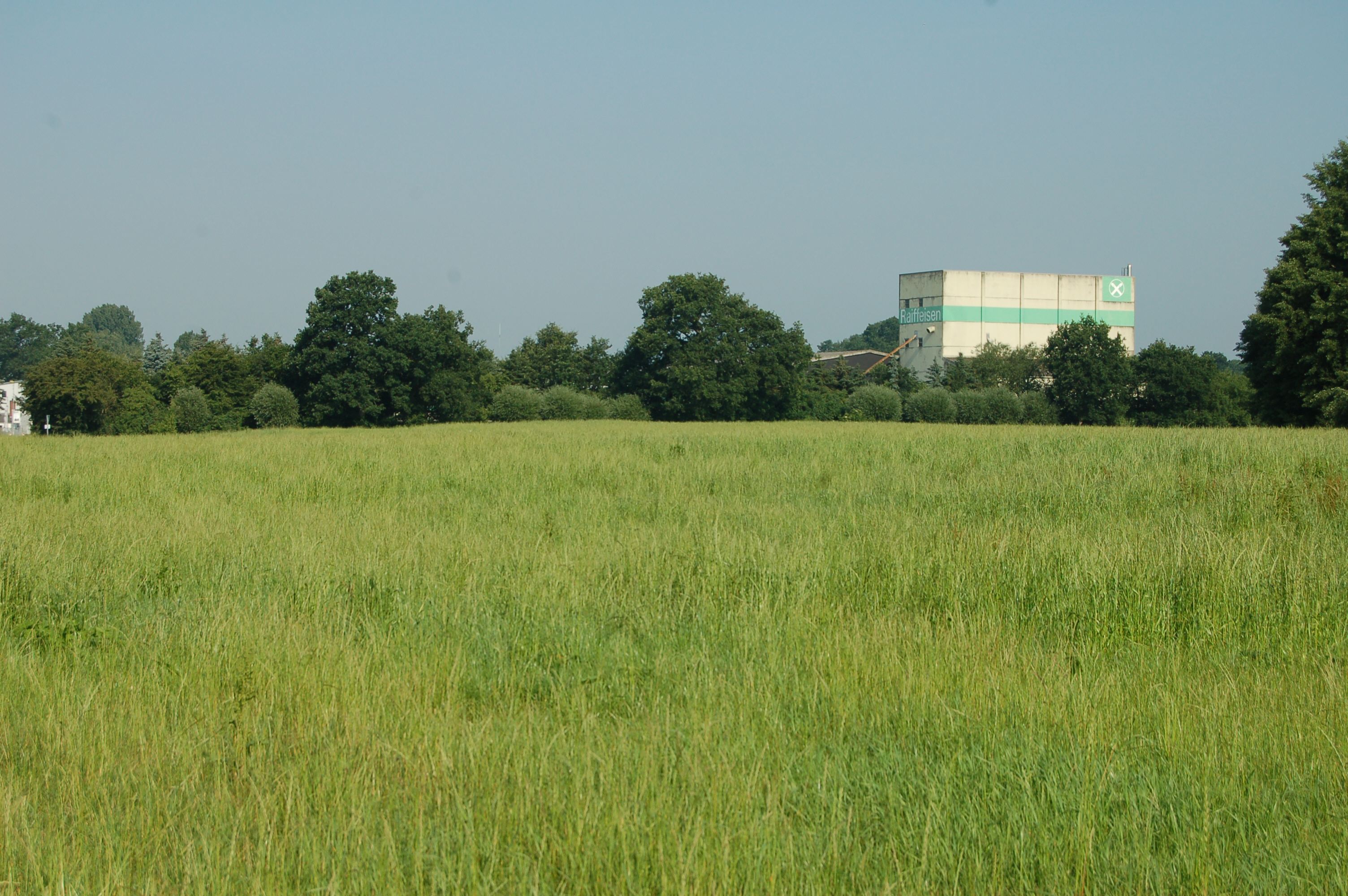 Eine der, mit dioxinhaltigen Papierschlamm belasteten Grünfächen in südosten der Stadt Uetersen.